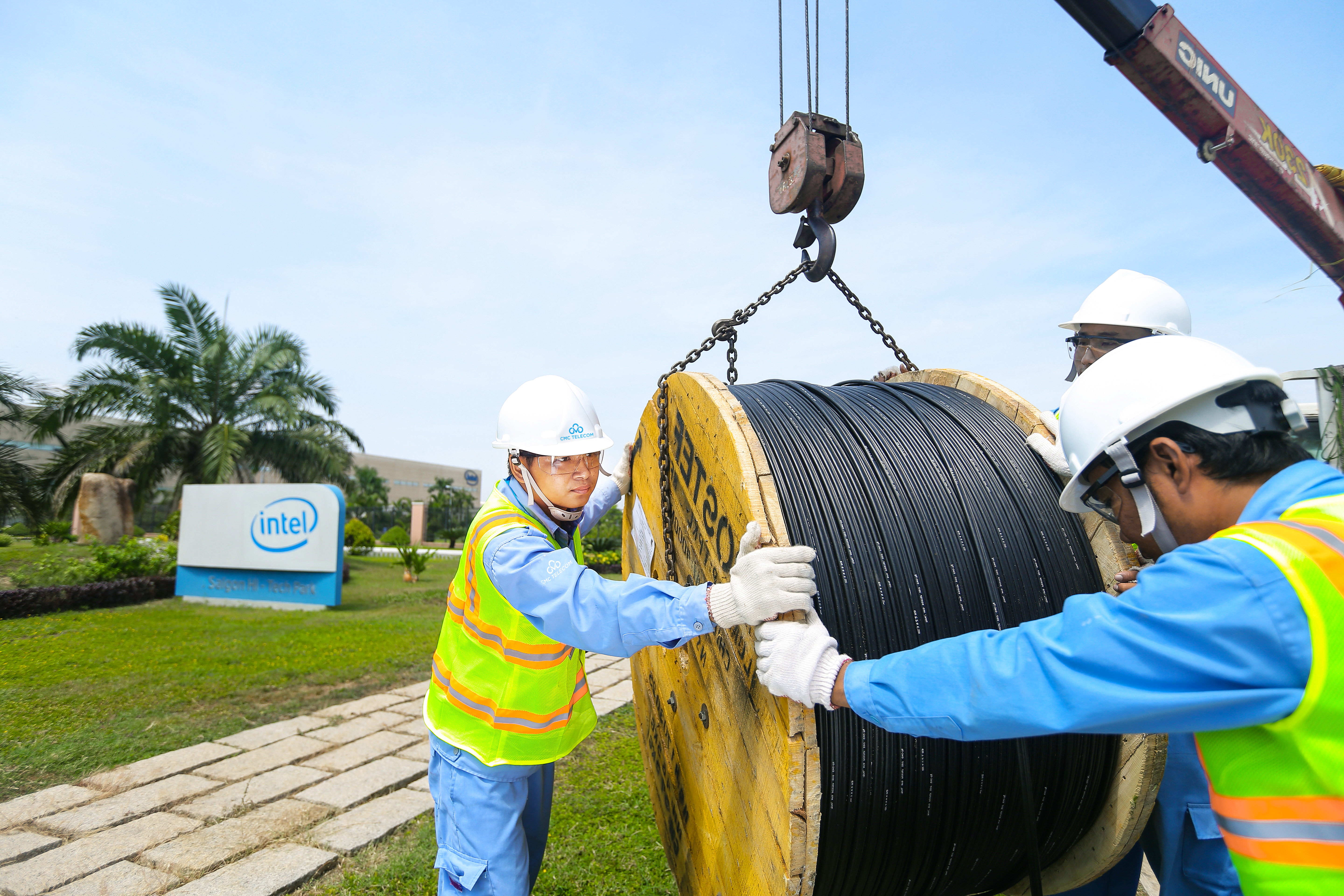 CMC Telecom triển khai kênh truyền cho các khu Công nghiệp